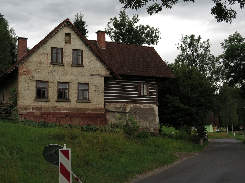 Usedlost čp. 29, Roztoky u Jilemnice 29, Roztoky u Jilemnice.